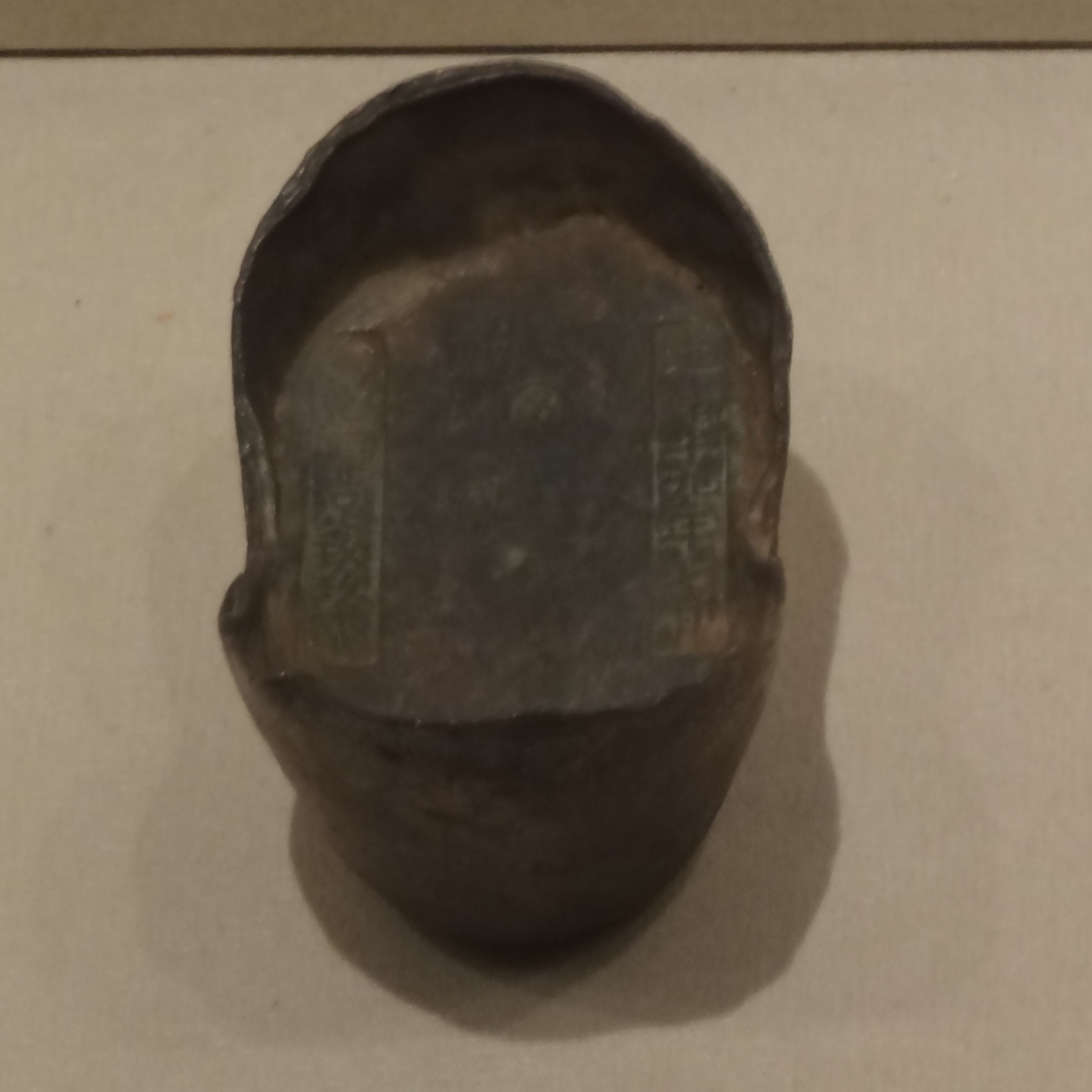 光绪十九年银锭，拍摄于山东博物馆